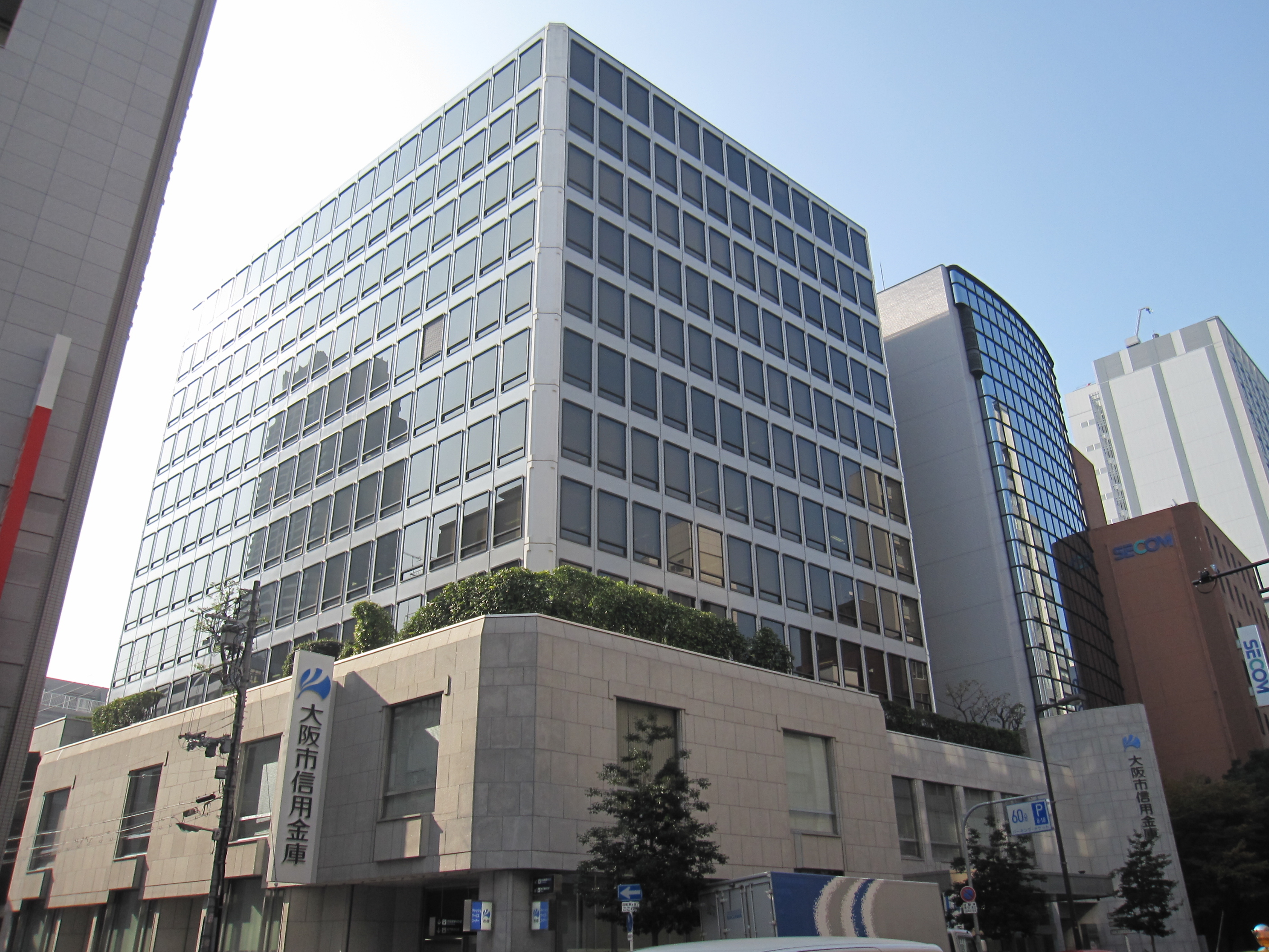 大阪市信用金庫本店 （現：大阪シティ信用金庫）